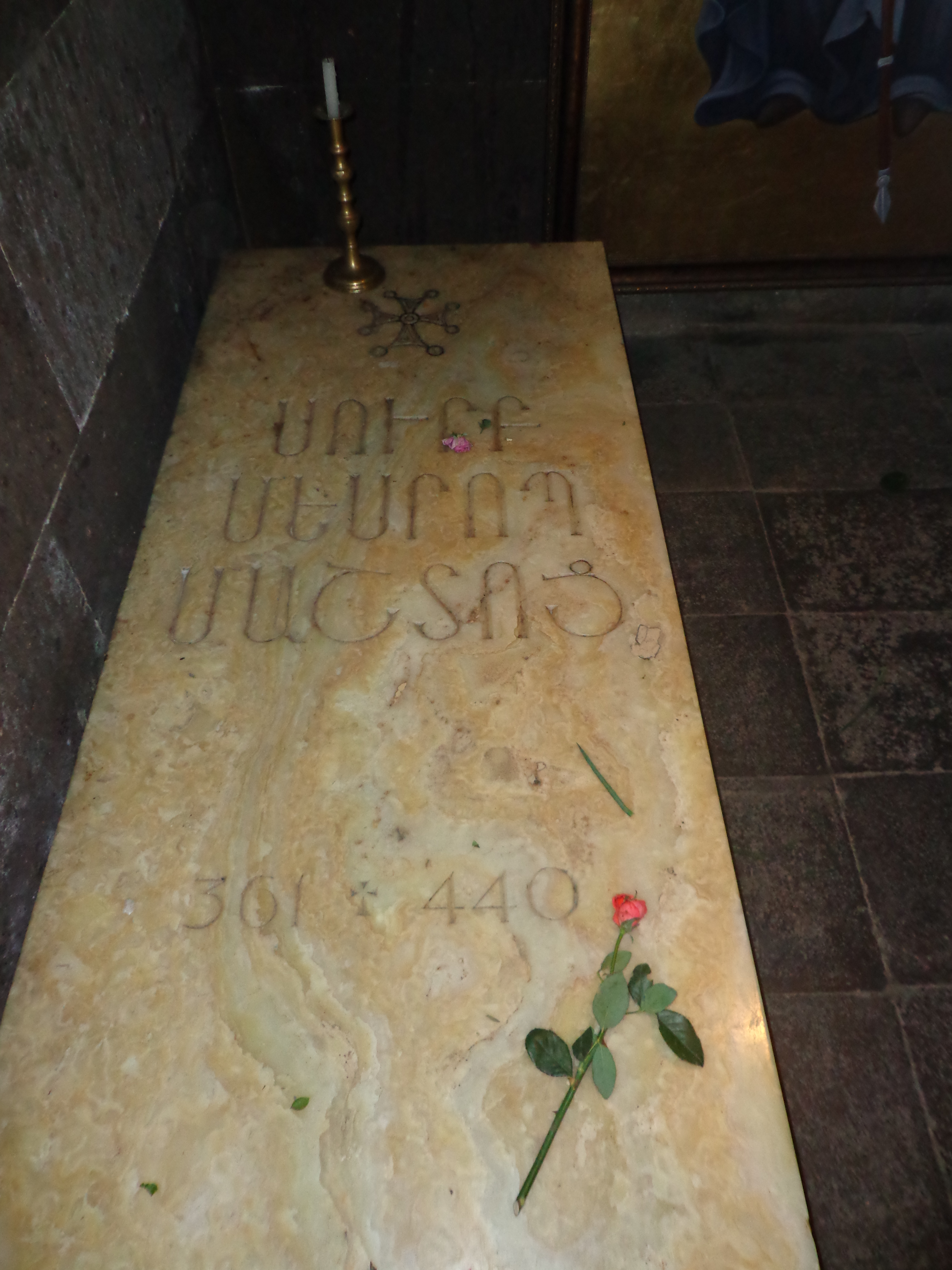 Մեսրոպ Մաշտոցի դամբարանը 113/22.2